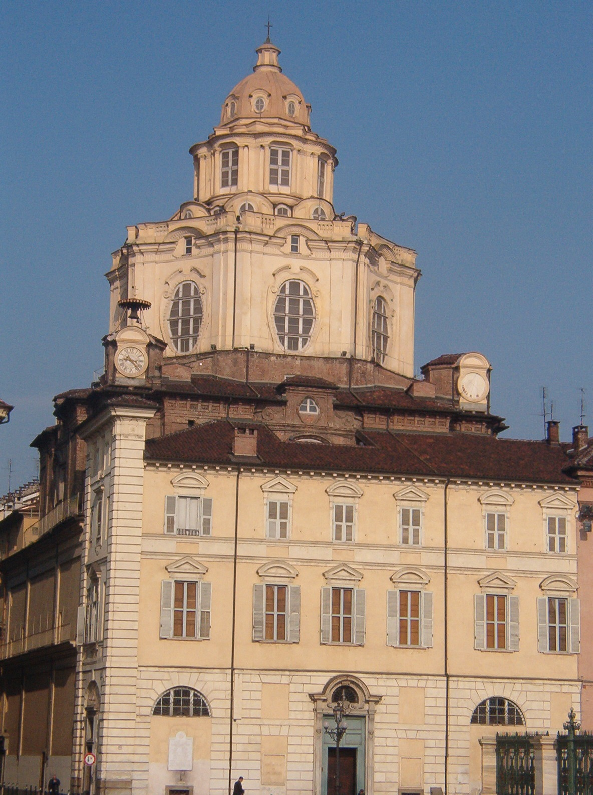 Chiesa di san Lorenzo - Torino - Italia